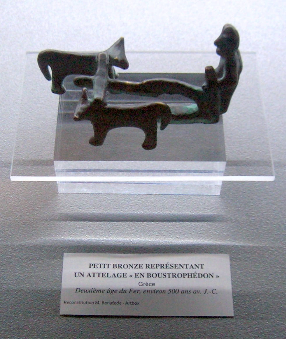 Musée des Merveilles, Tende, Alpes-Maritimes, Provence-Alpes-Côte d'Azur, France.